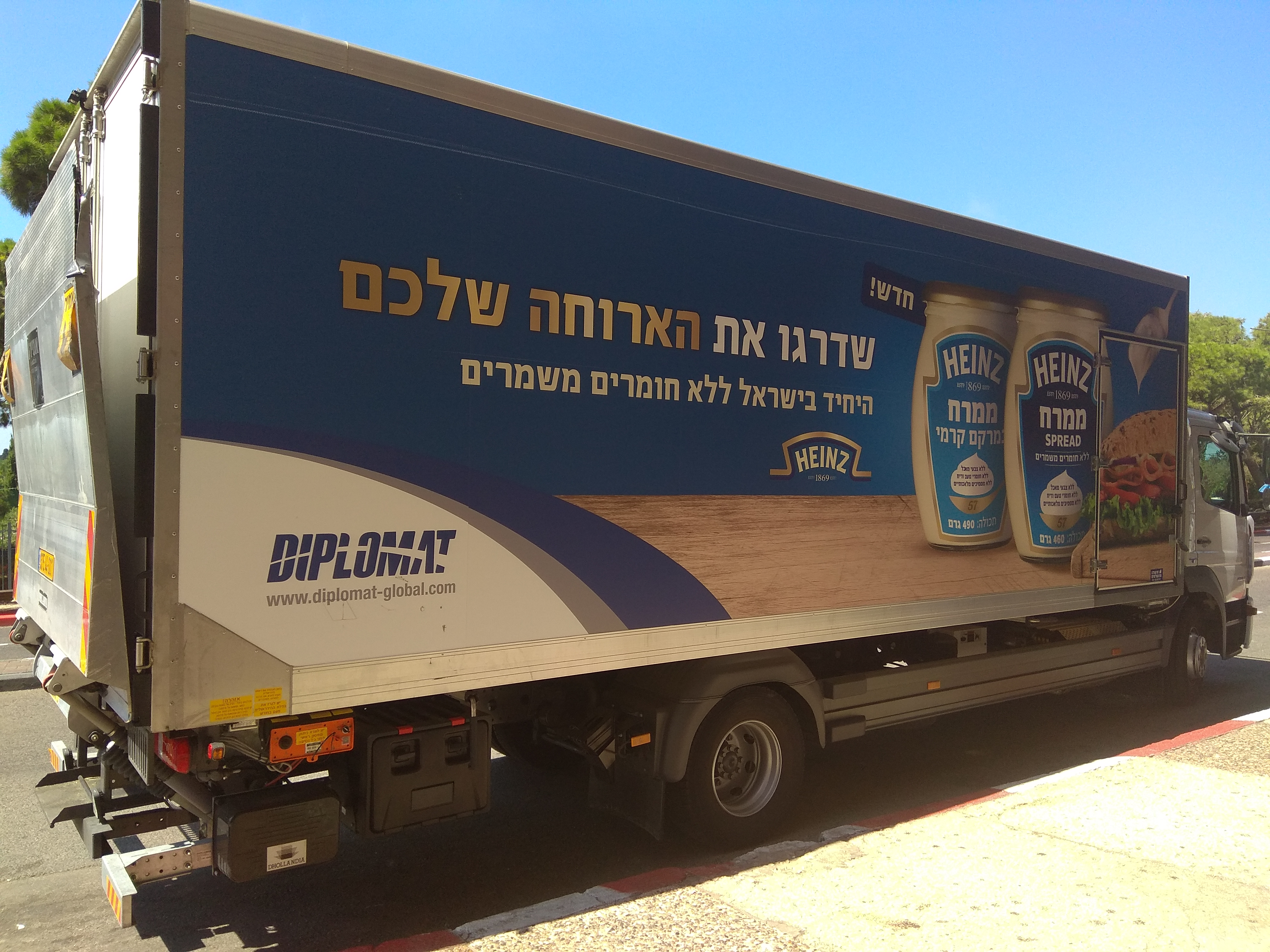 משאית הפצה של חברת דיפלומט